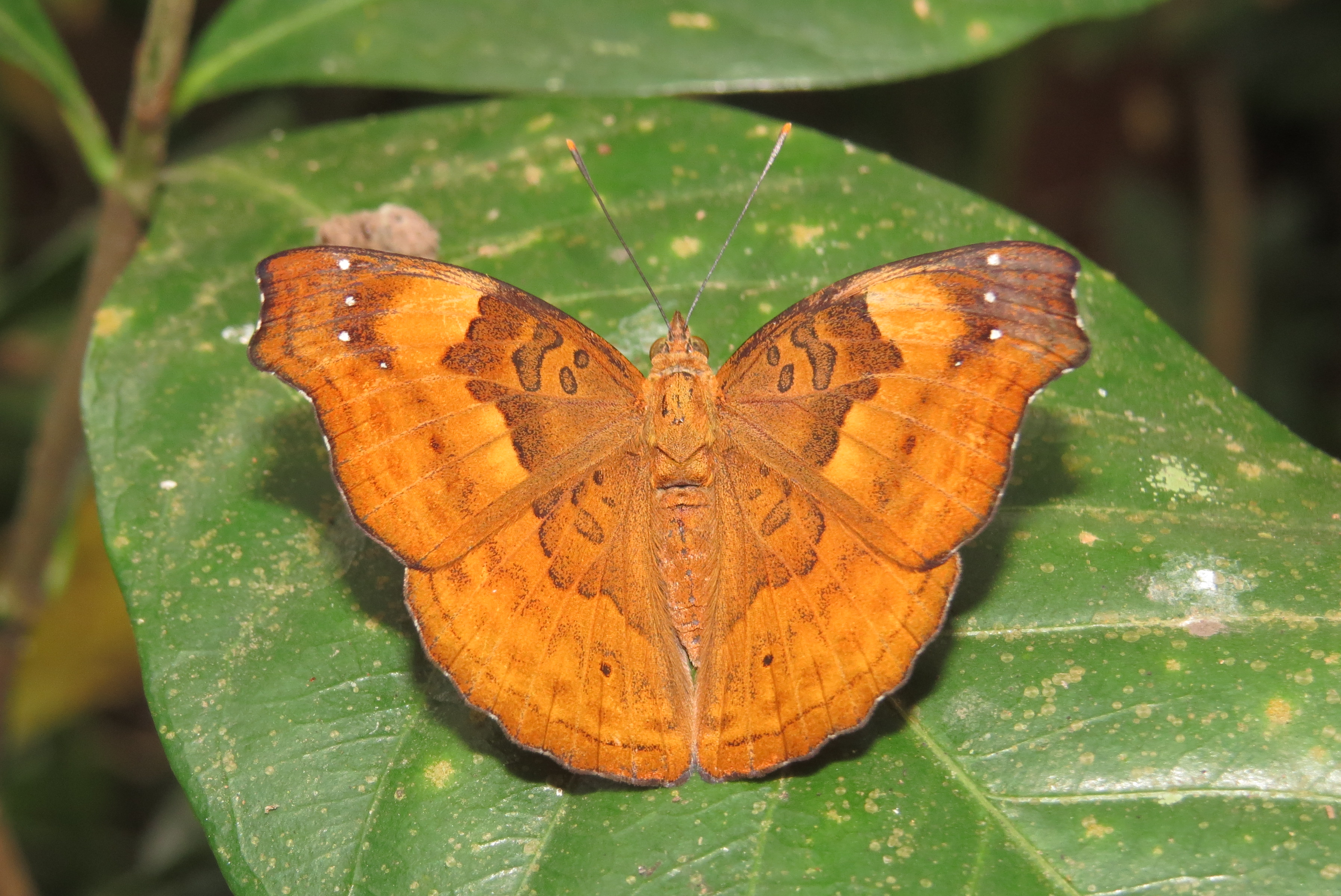 Rohana parisatis Westwood, 1850 – Black Prince at Periya, Wayanad